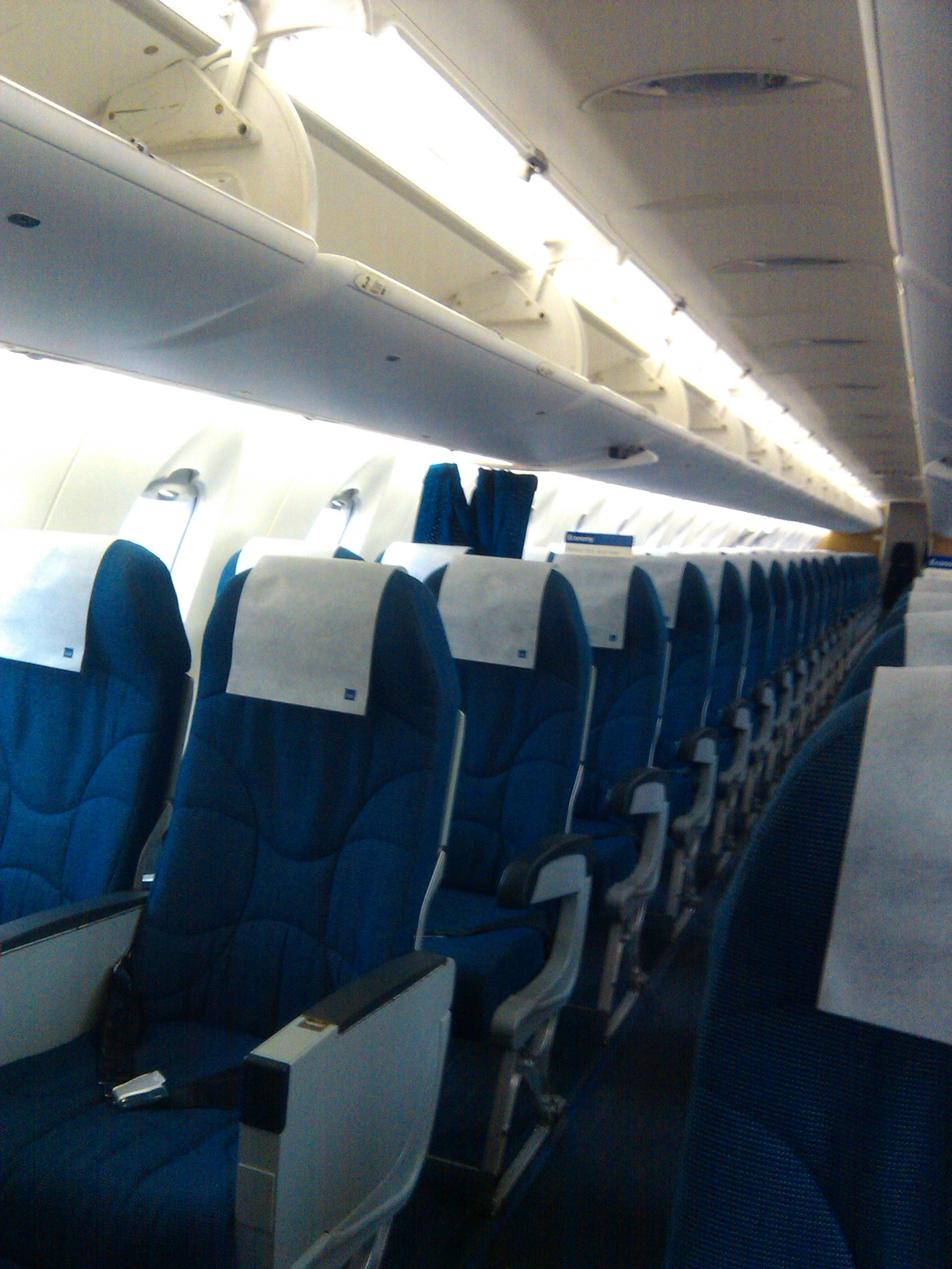 Interior SAS CRJ 900